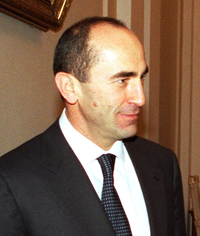 Robert Kocharyan, Armenian President